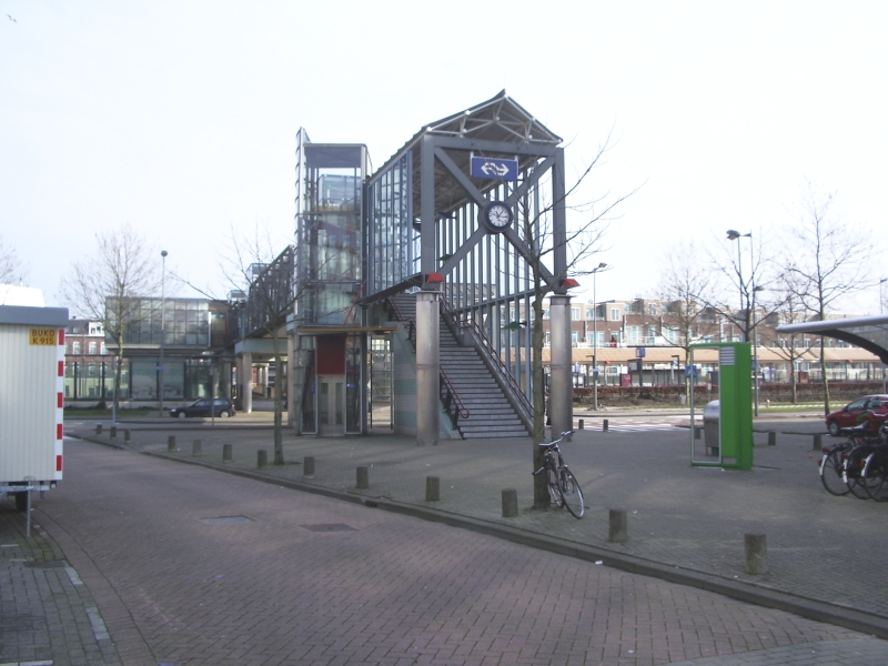 Station Rotterdam Zuid. Eigen werk, februari 2007 Rotterdam Zuid railway station. Own work, february 2007